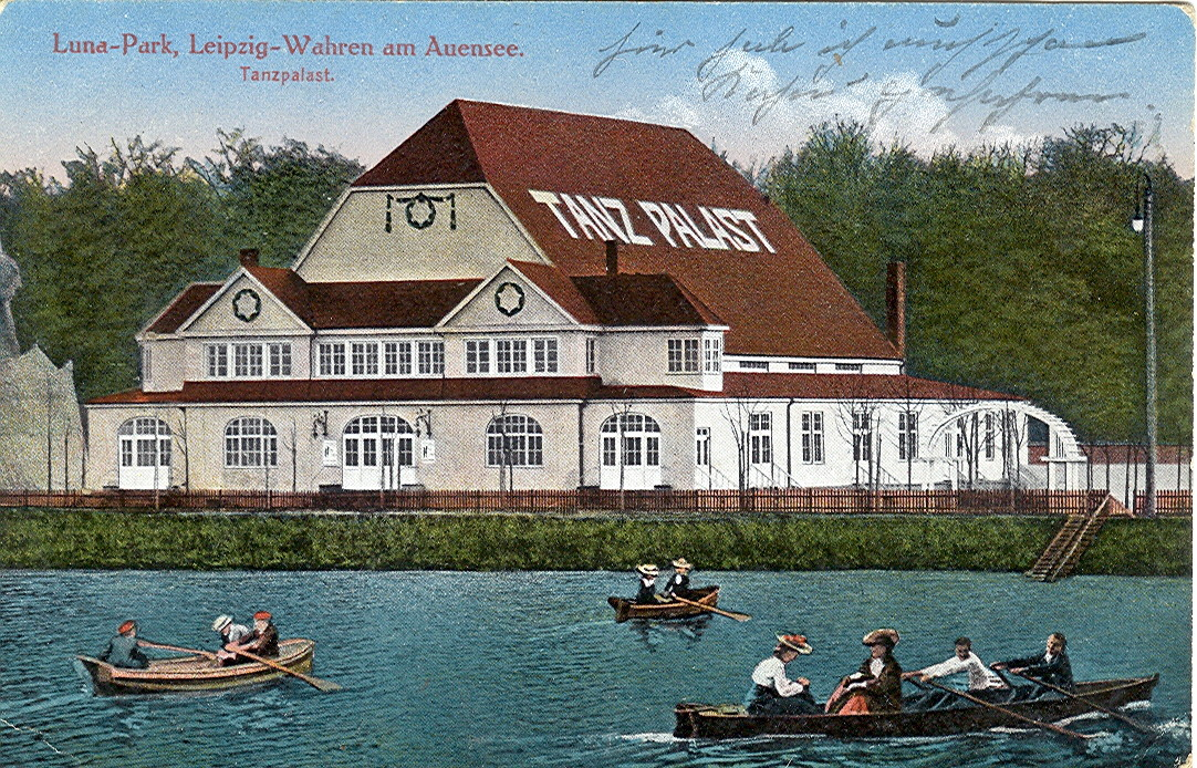 Postkarte, datiert 12.1.1917. Beschriftung: "Lunapark, Leipzig-Wahren am Auensee - Tanzpalast."